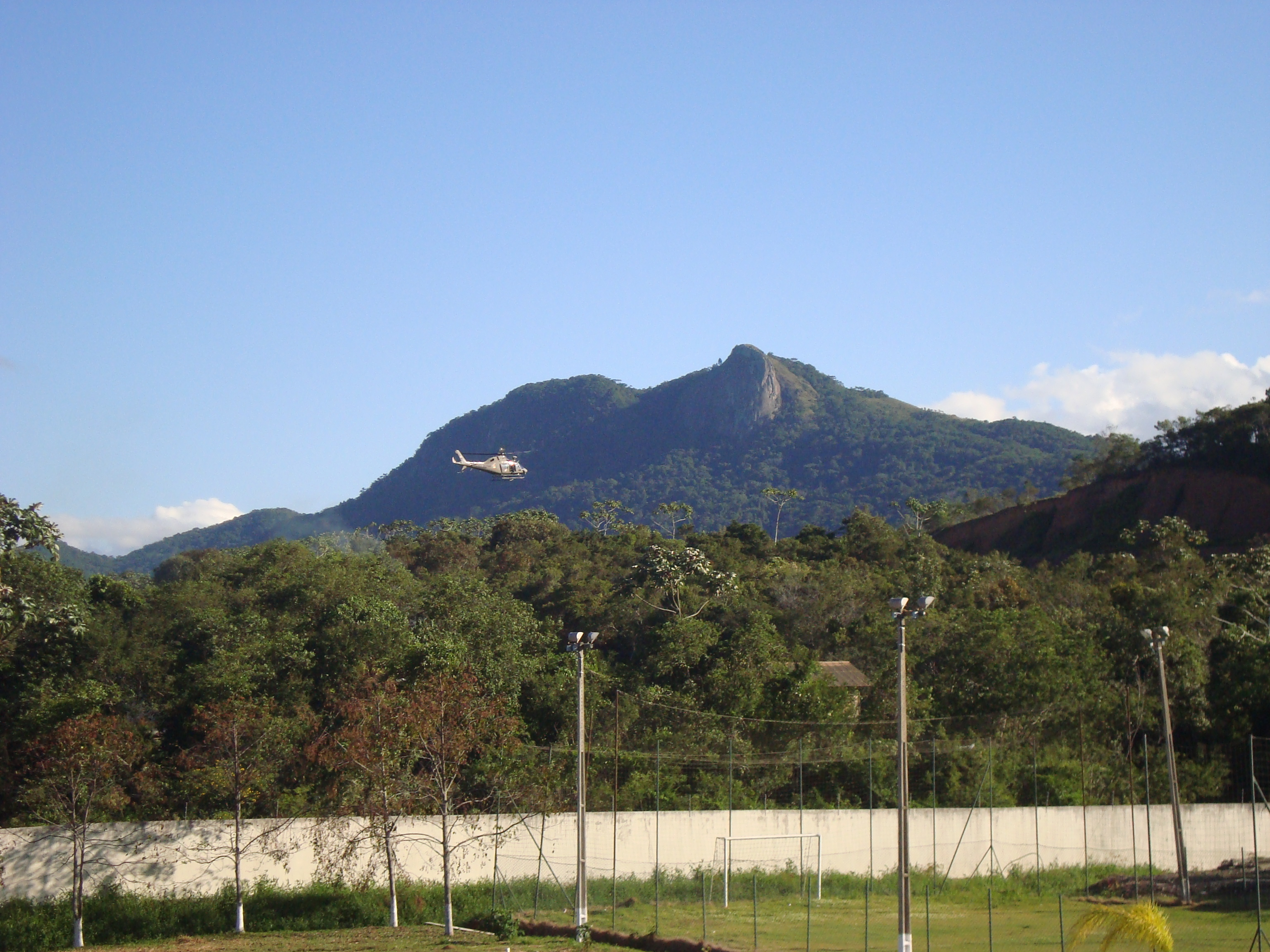 Sobre-Voo Policia Militar ao fundo Pedra Branca_By Mauro Soares